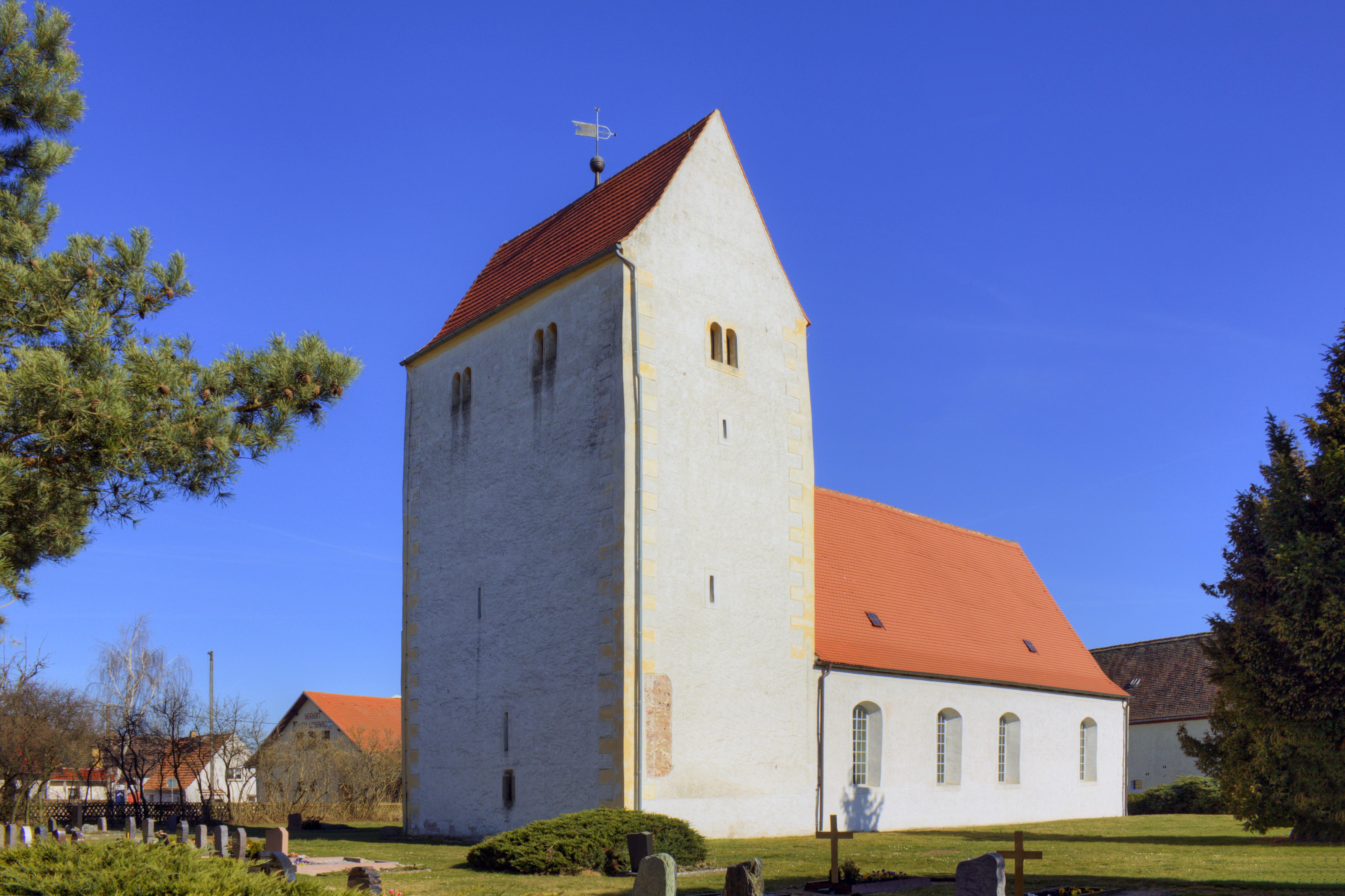 Kirche, An den Linden 1b in Torgau OT Loßwig Kirche in bei Torgau